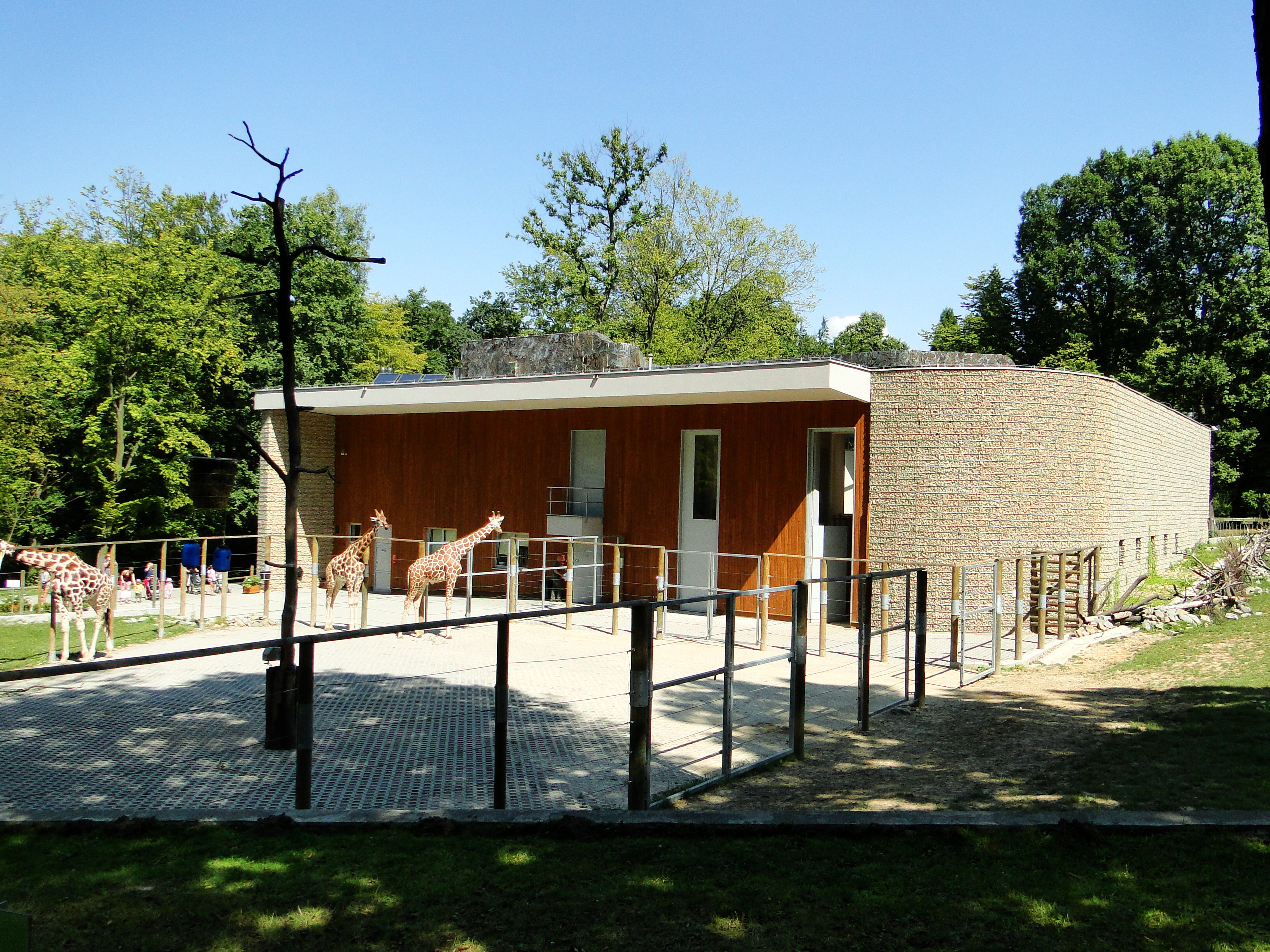 Żyrafy w krakowskim ZOO